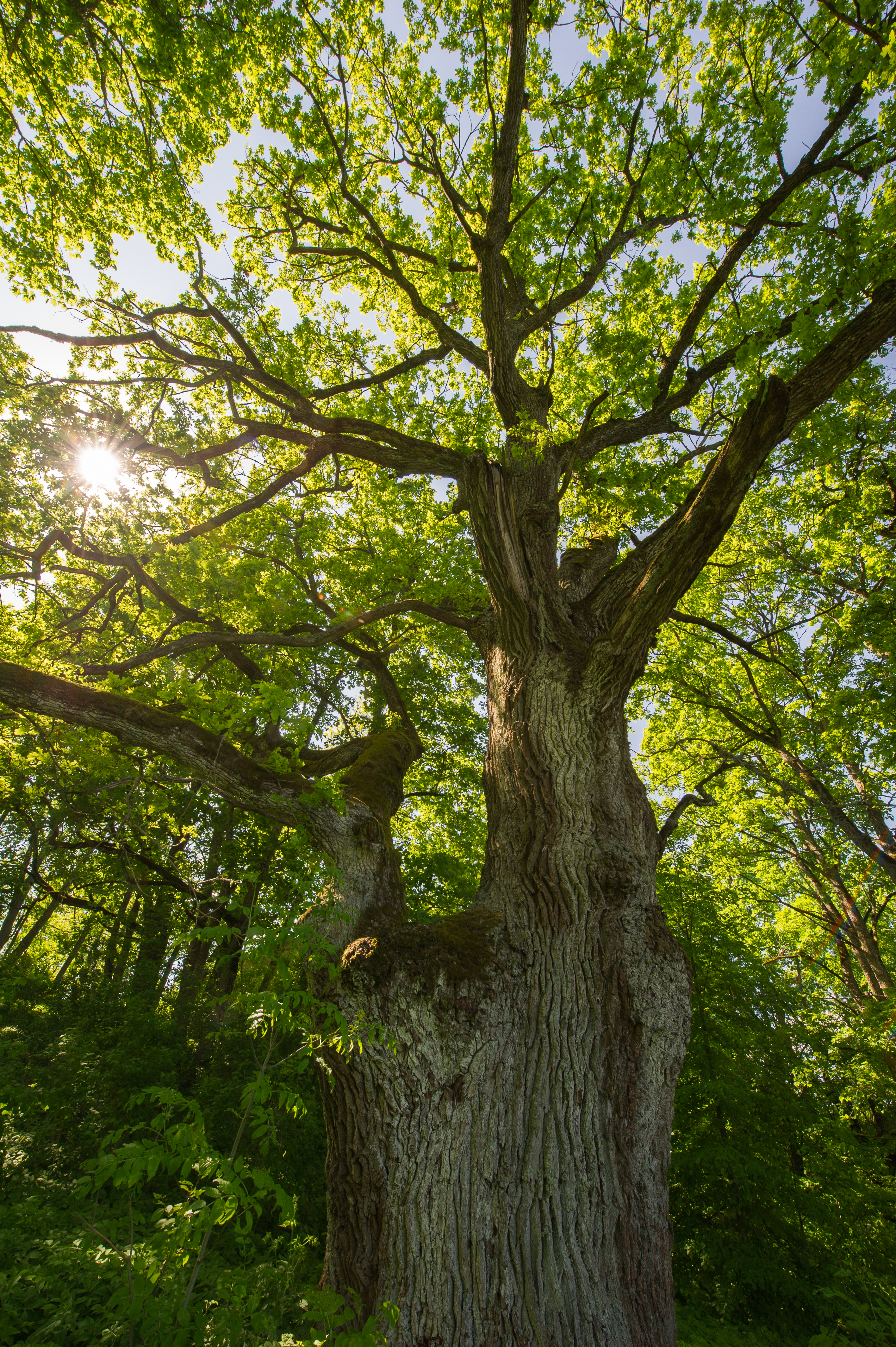 Ilzenbergo Ąžuolas. Kamieno apimtis 1.3 metro aukštyje- daugiau kaip 5ki metrai.